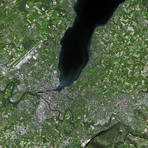 Geneva by SPOT Satellite